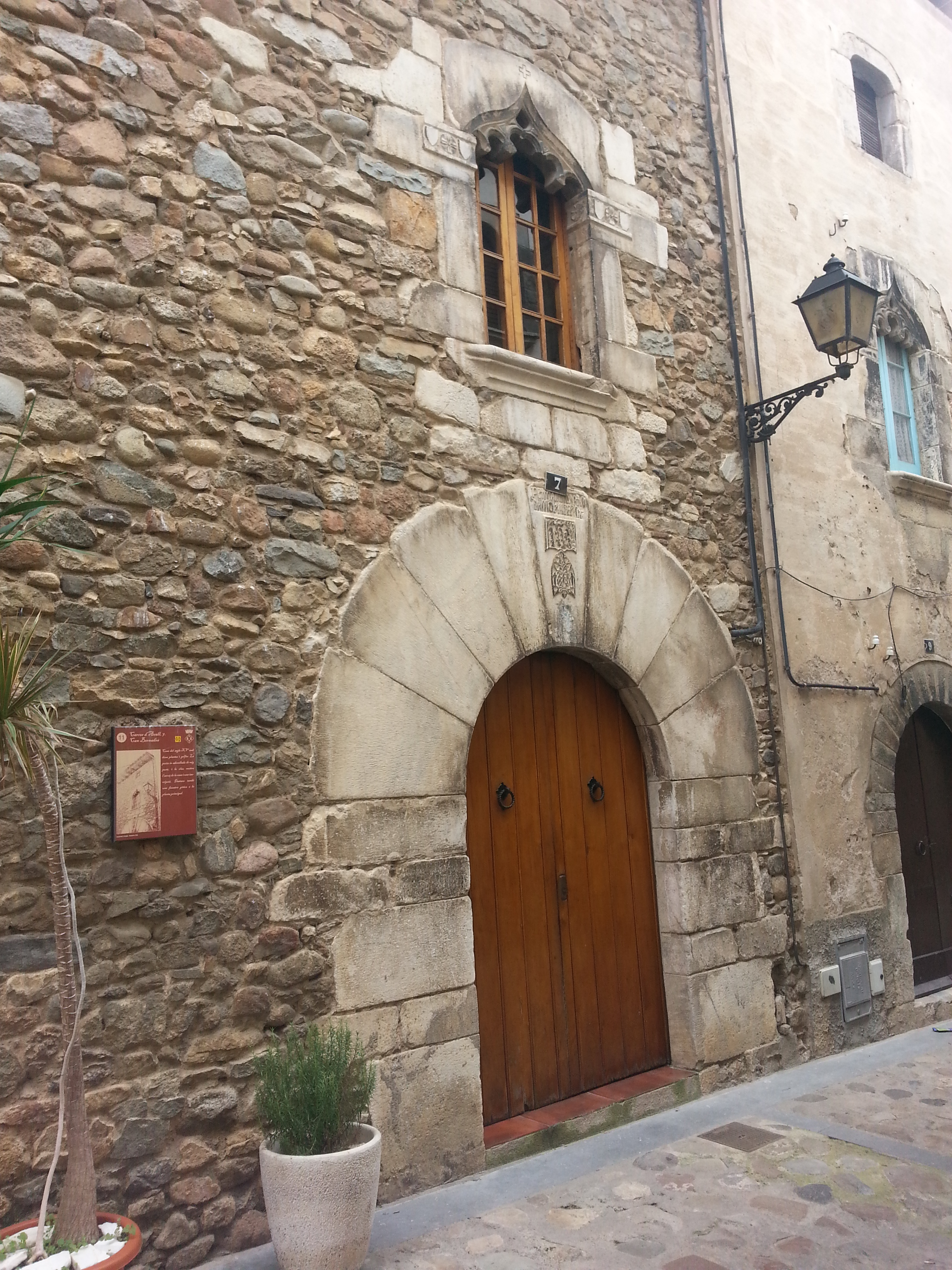 Can Barnades, o Can Mau de l'Aguidó (Anglès)